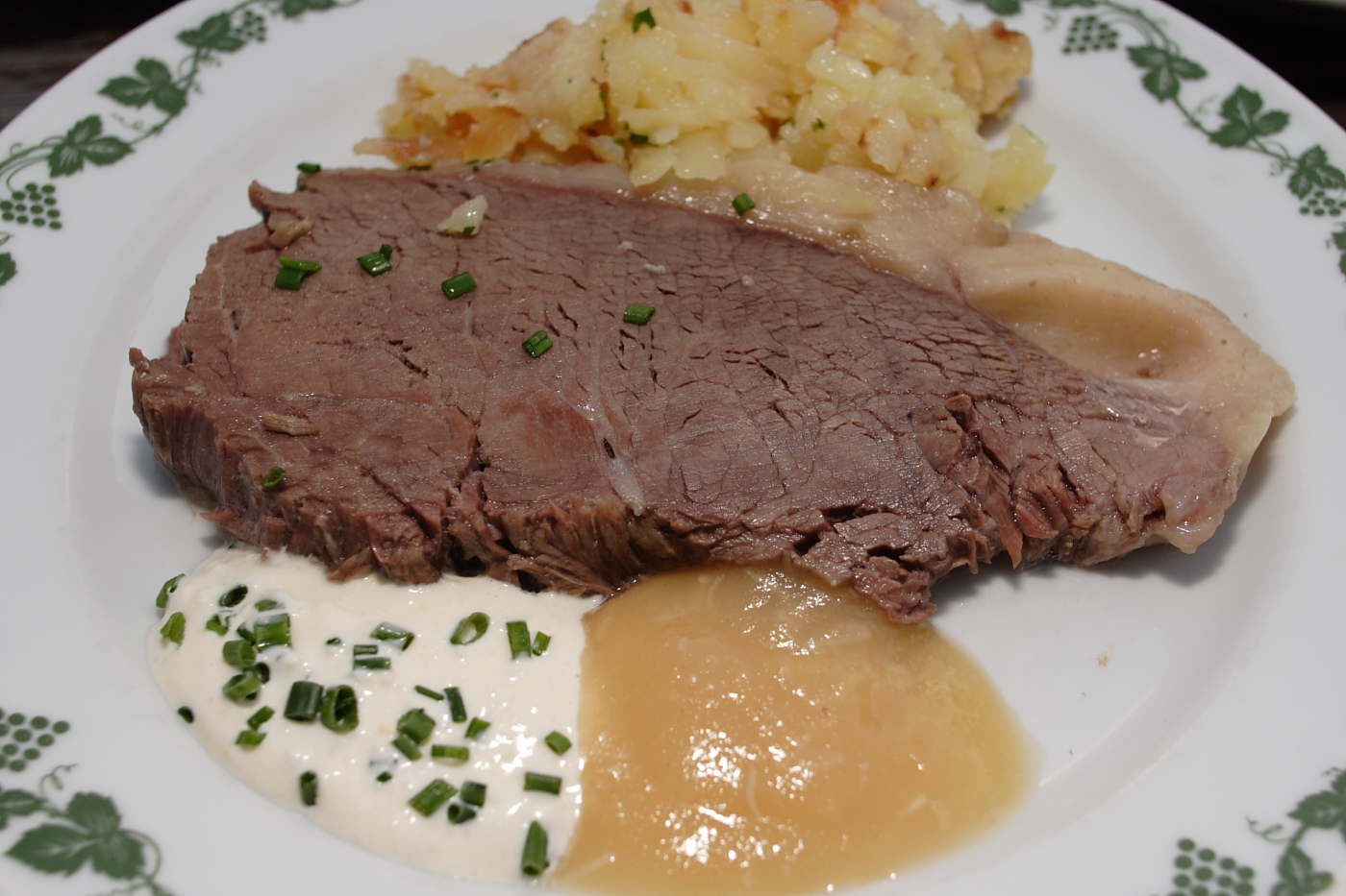 Tafelspitz mit Schnittlauchsauce, Apfelkren und Rösterdäpfel